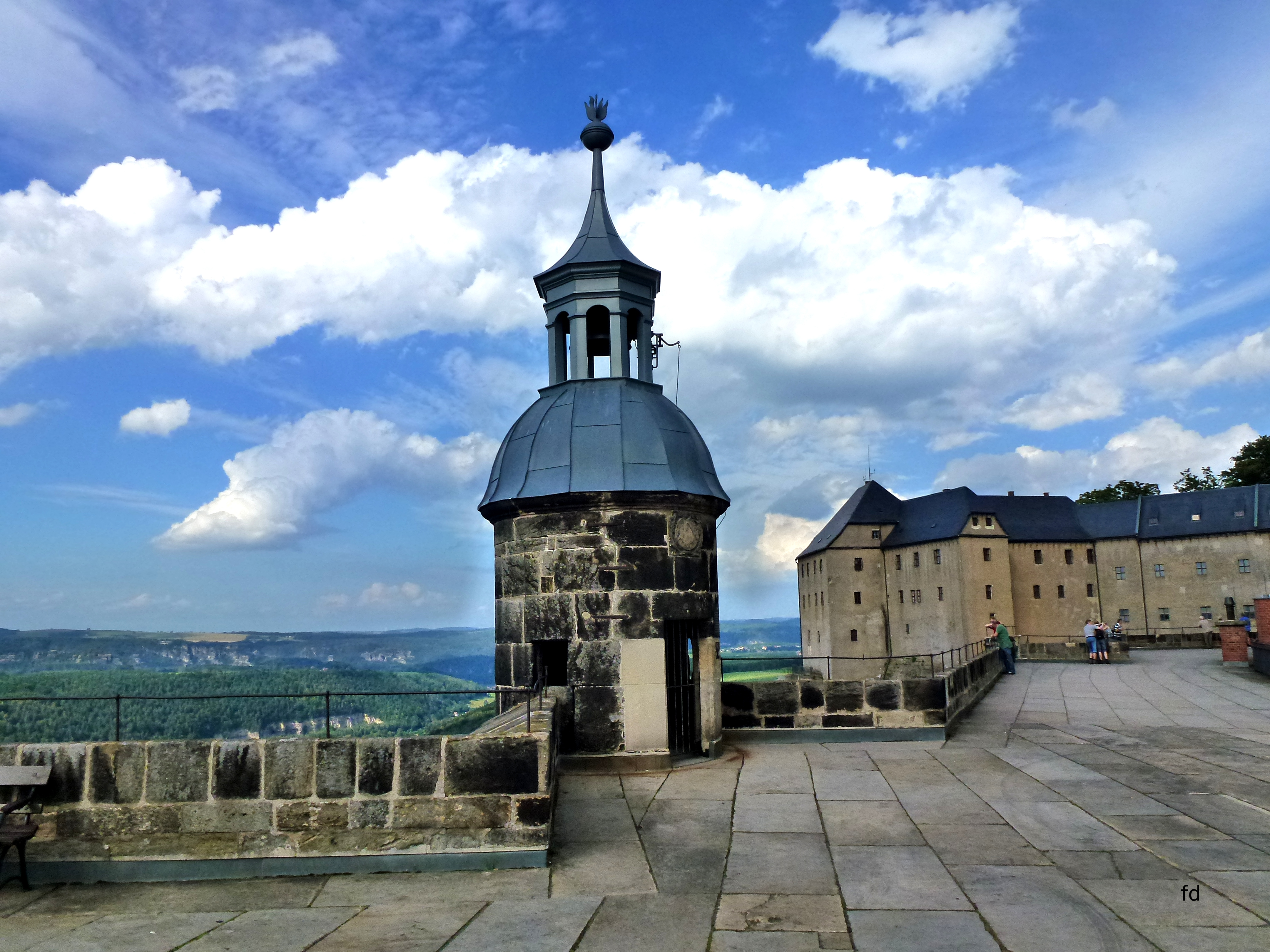 Festung Königstein Der Seigerturm (Seiger – Uhr) ist einer von 8 Beobachtungs- und Flankierungstürmen der Festung,die nach 1600 erbaut wurden. Er ist mit einer Sonnenuhr ausgestattet.Außerdem besaß er eine Seigerschelle (feste Glocke zum Anschlagen der Stunden), an der die Schildwache Viertel-und volle Stunden nachschlug,sobald die Uhrglocke der Magdalenenburg geschlagen hatte. So wurde den wachhabenden Soldaten unterhalb der Festung die Uhrzeit mitgeteilt.